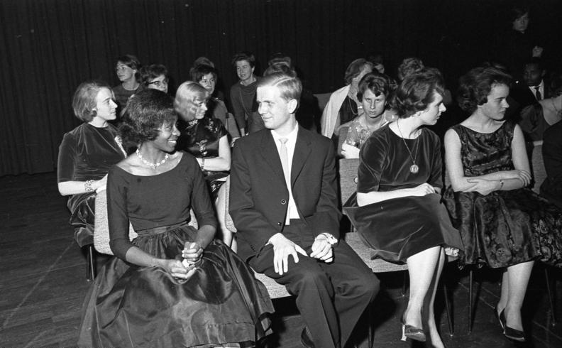 Ausstellung u. Musikabend des DAAD in der Beethovenhalle